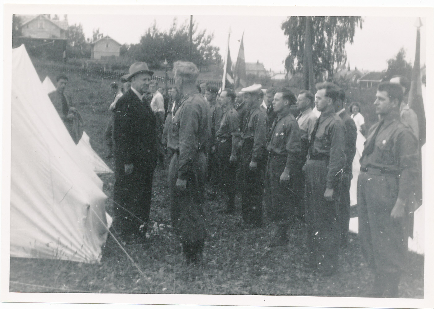 RA/PA-0781/0020/1671 1213 Nasjonal Samling, forkortet NS, var et norsk politisk parti som ble grunnlagt av Vidkun Quisling i 1933 og ble oppløst ved frigjøringa i 1945. Ideologisk fulgte partiet den tyske nasjonalsosialismen tett, og NS ble støtteorganisasjon for den tyske okkupasjonsmakta i Norge under andre verdenskrig.